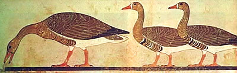 Gansos de Medum (Arte Egípcia Antiga)